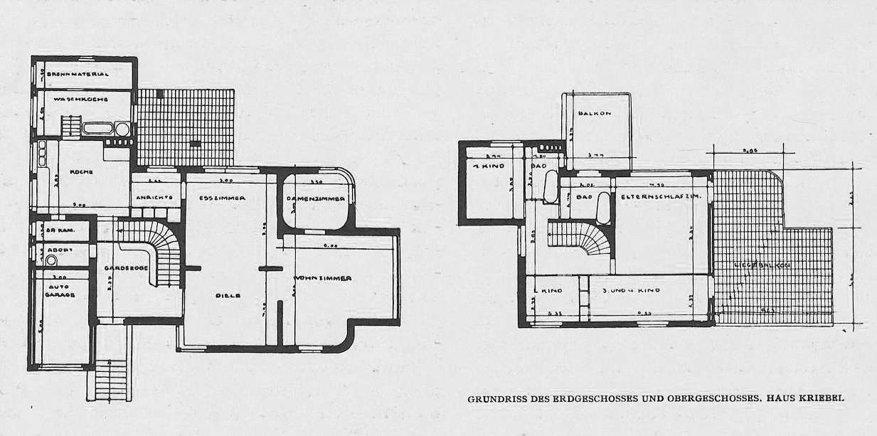 Rzutu parteru i I piętra